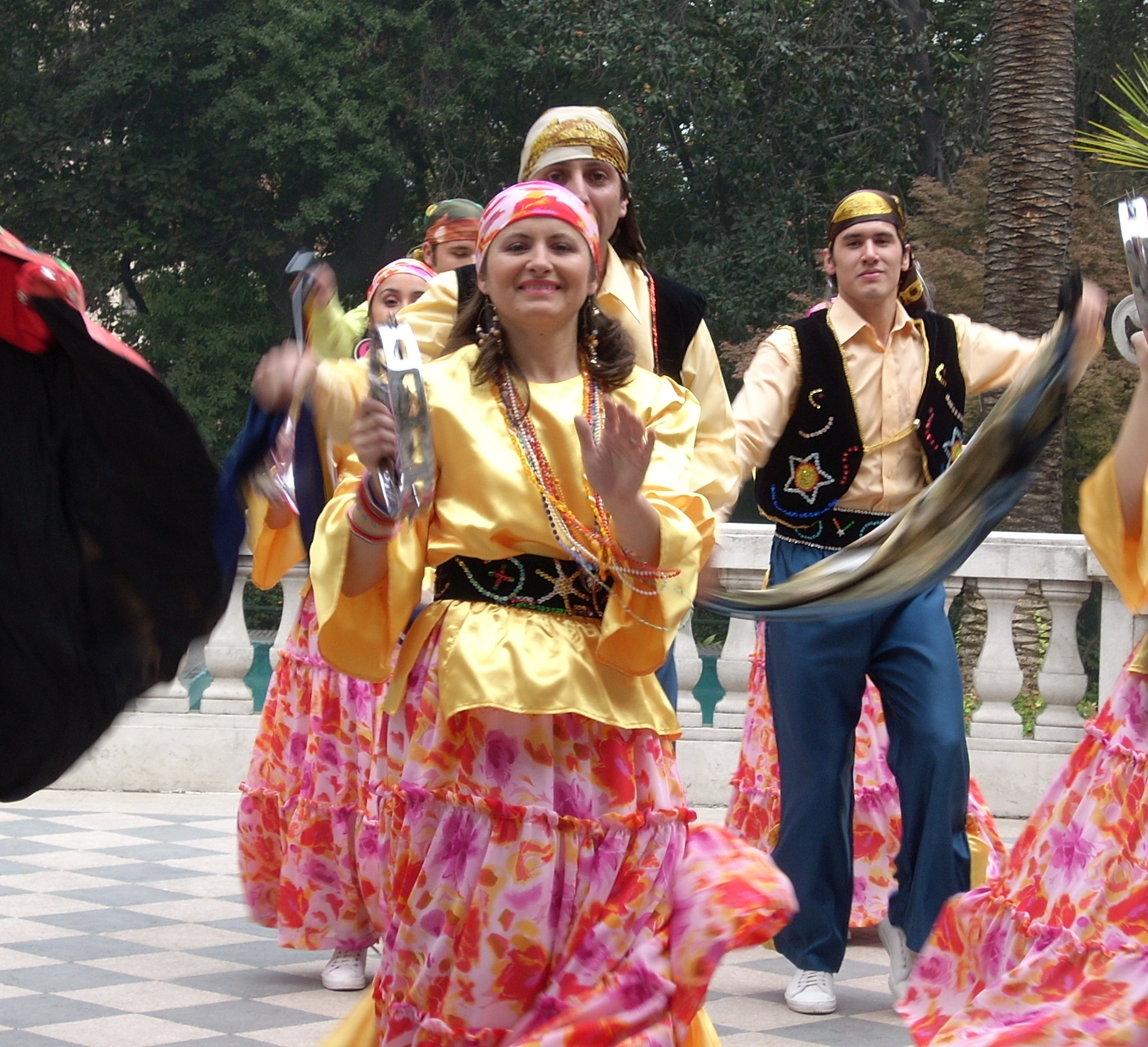 Grupo PALOMAR